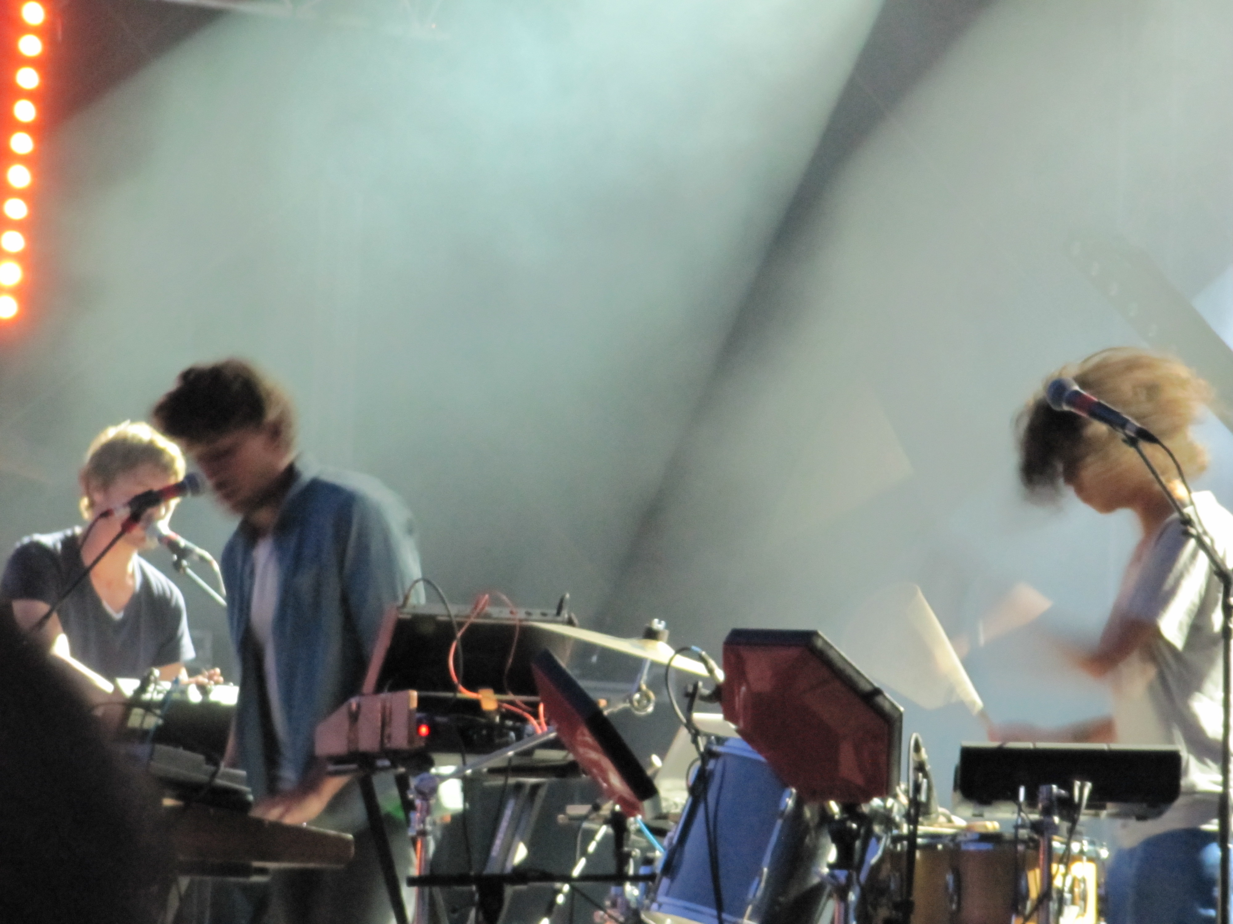 Yuksek au festival Cabaret Vert, en Ardennes, France